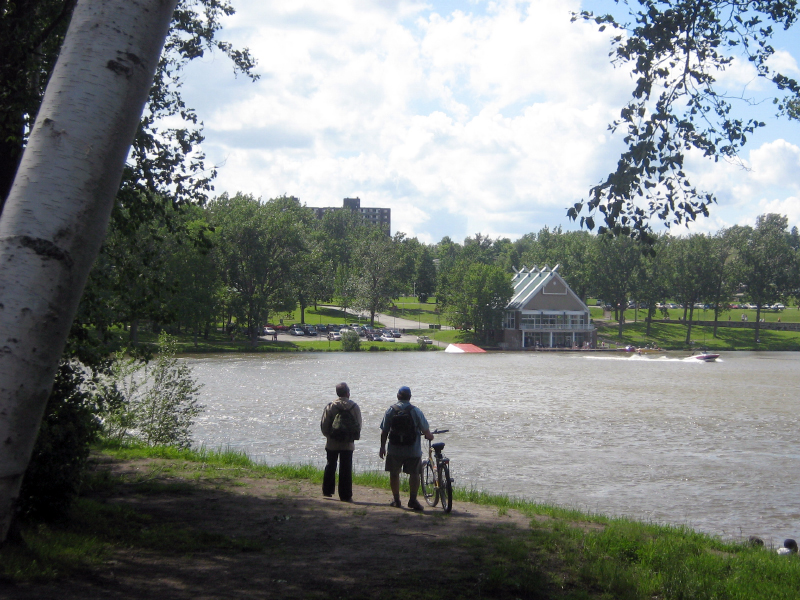 Parc Jacques-Cartier et lac des Nations, Sherbrooke